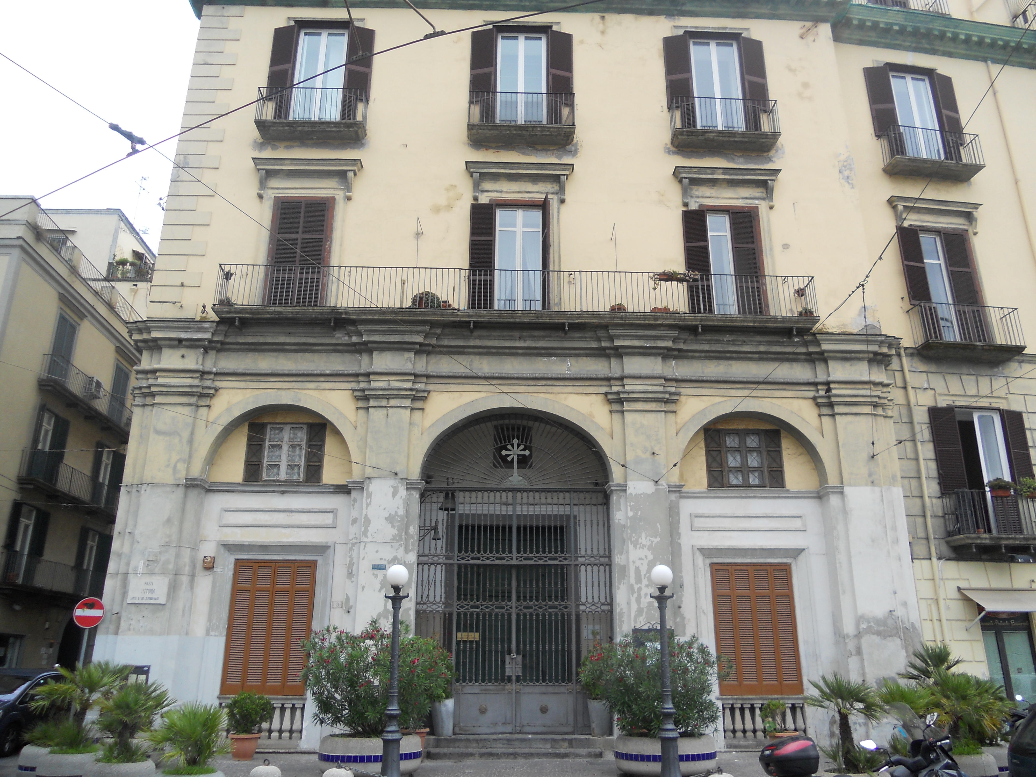 Facciata, Santa Maria della Vittoria, Napoli